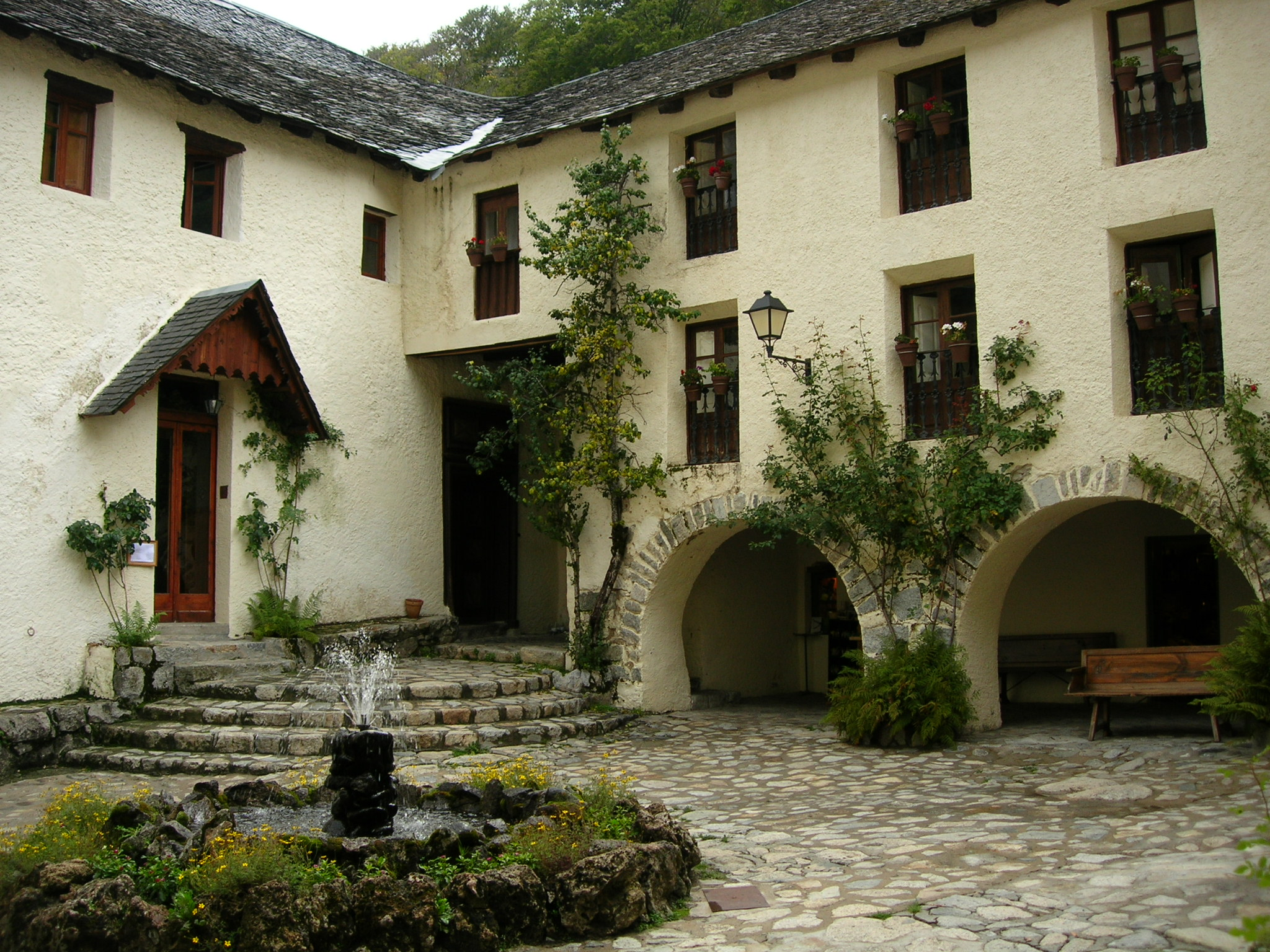 Balneari de Caldes de Boí (la Vall de Boí)